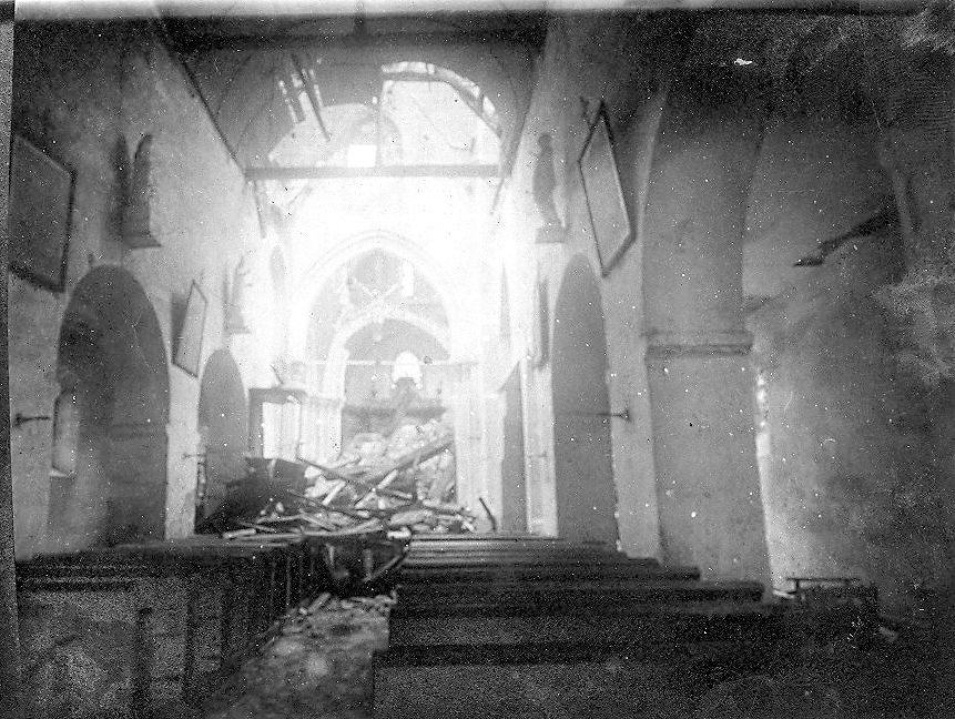 Vue intérieure en 1910.